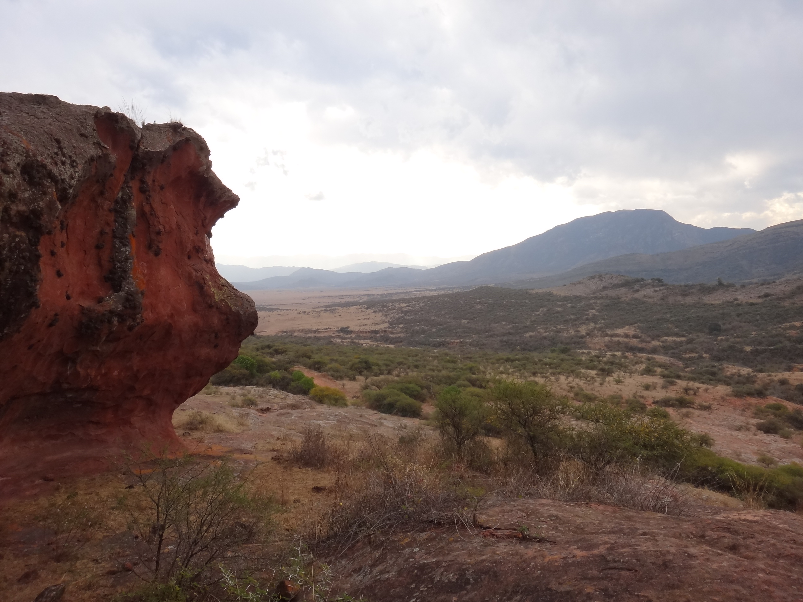 Yacimiento de arte rupestre en las Cuevas Pintadas